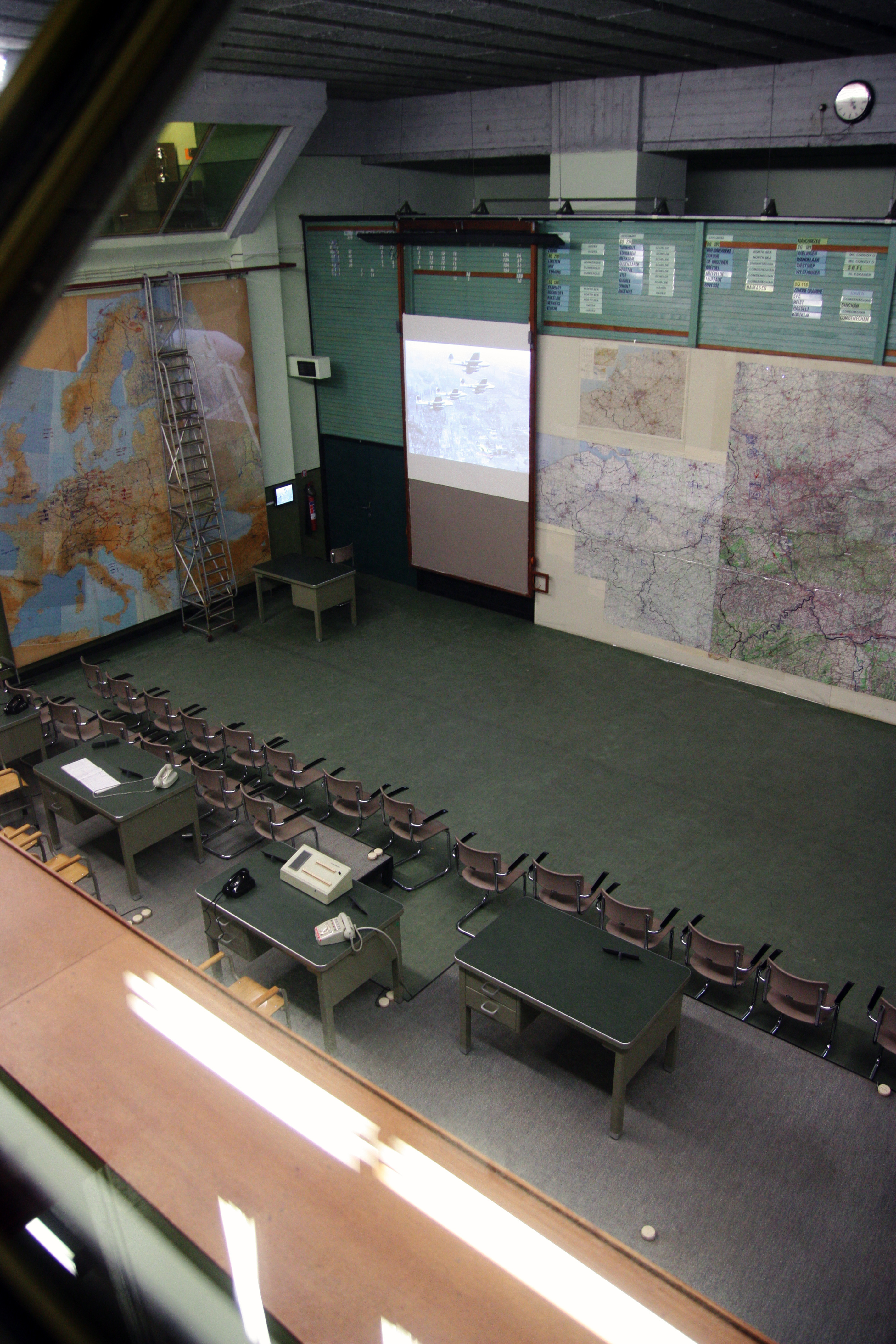 Vue de la salle des opérations des bureaux d'état-major interarmées 2 et 3 dans le bunker de commandement dans le Kemmelberg.